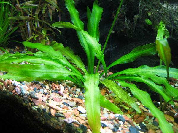 Aponogeton undulatus (Original: 242083505_bb8bd3d420_o.jpg)